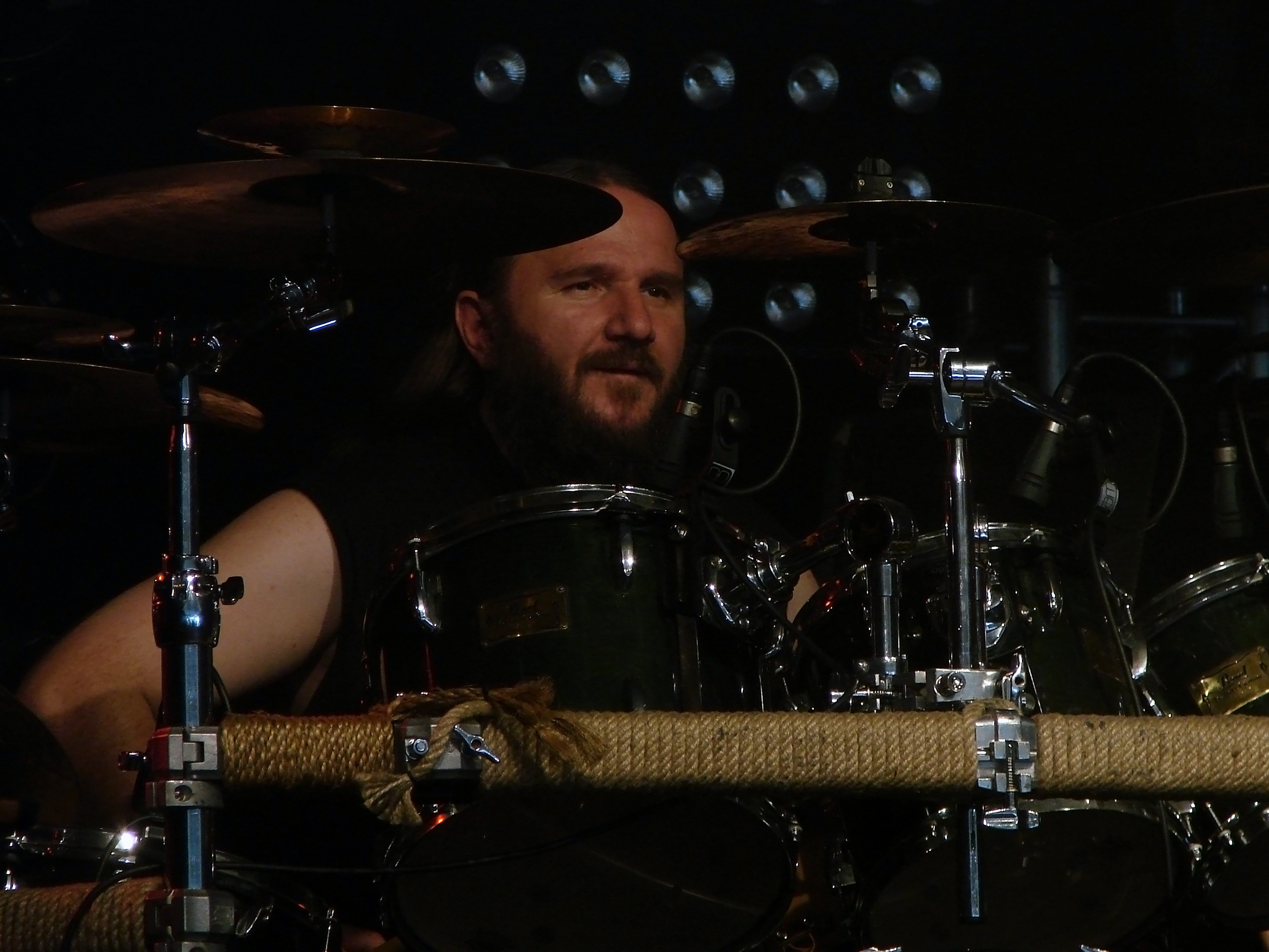 Negură Bunget au Hellfest 2010, à Clisson.